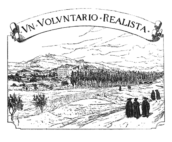 Contraportada del episodio nacional "Un voluntario realista" de Benito Pérez Galdós. Ilustraciones de Gómez Soler y Pellicer.